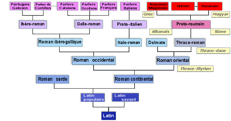 Langues romanes orientales et leurs influences, parmi les langues romanes.